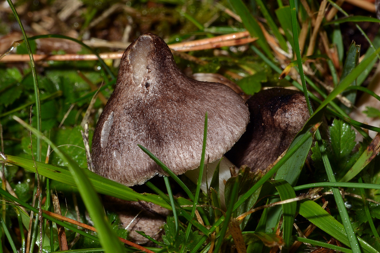 Ce champignon présente un chapeau gris, un pied blanc à base bleutée